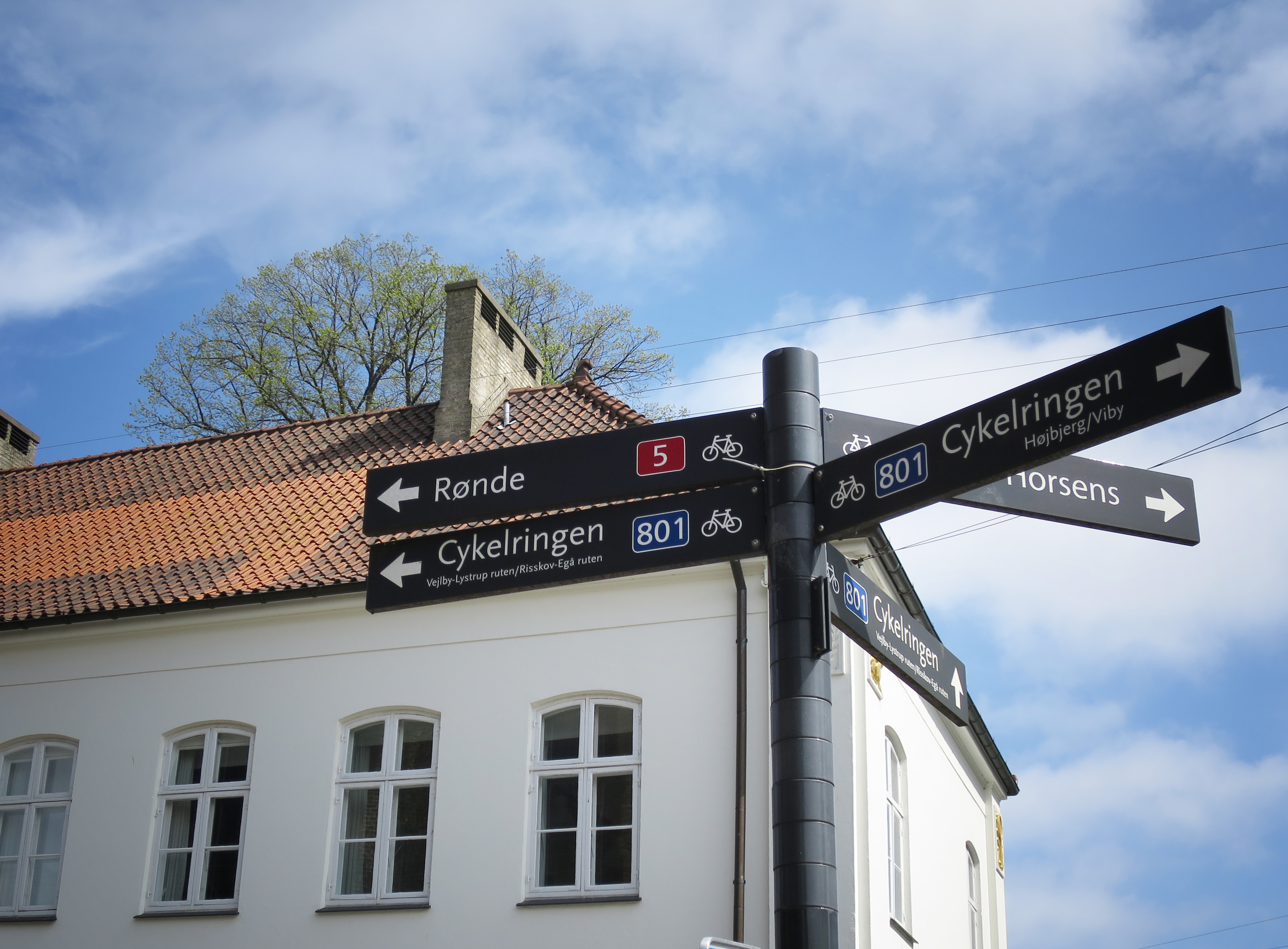 Cykelring skiltning i Aarhus.